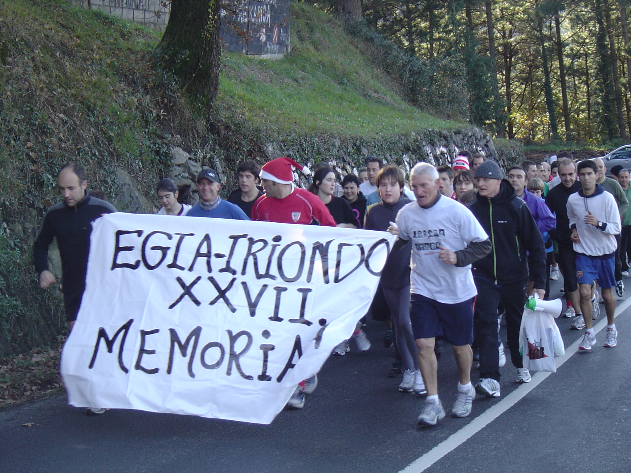 Protesta urteko argazkia.